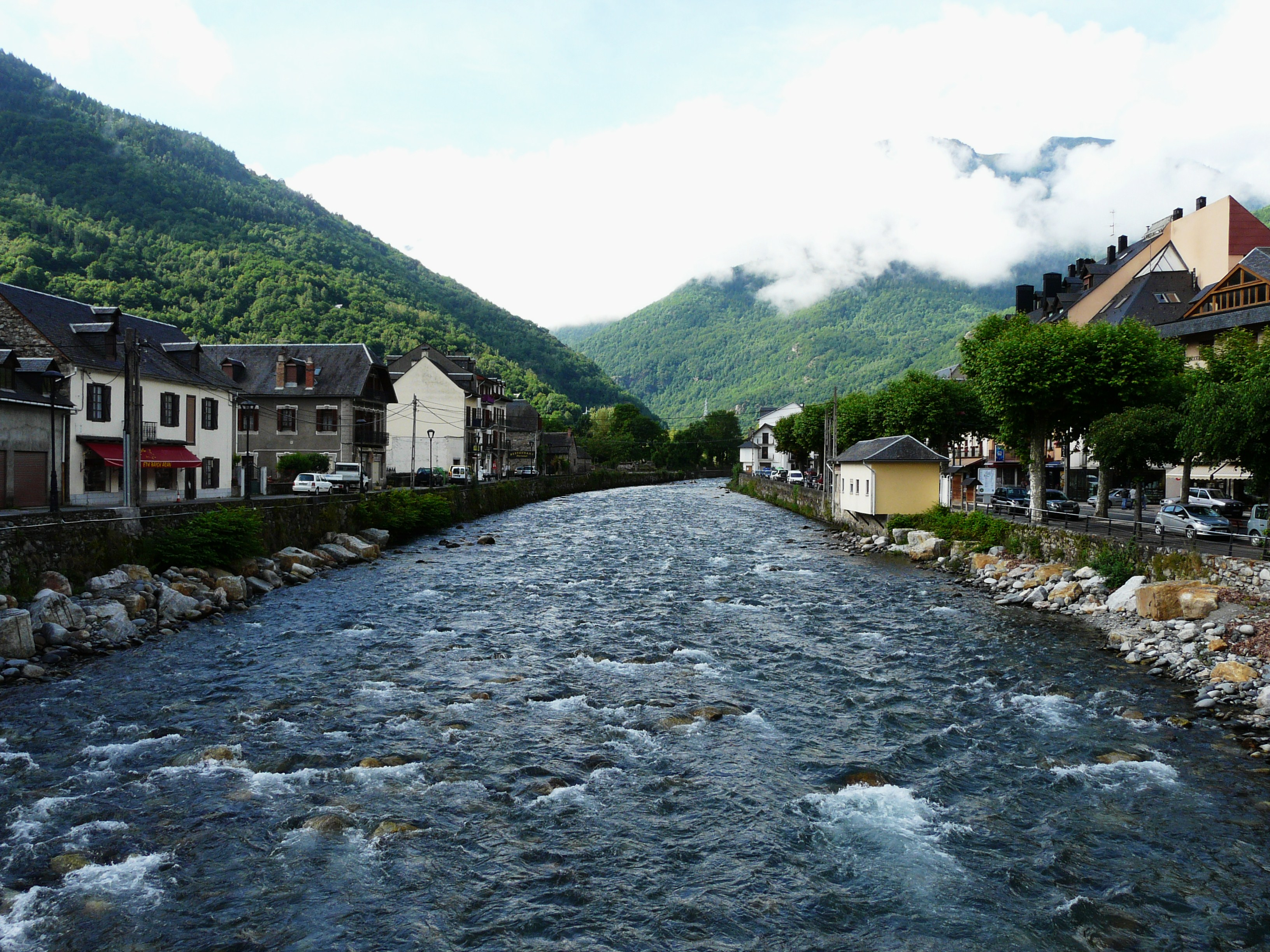 La Garonne en amont du pont dans le village de Bossòst, Val d'Aran, Catalogne, Espagne.